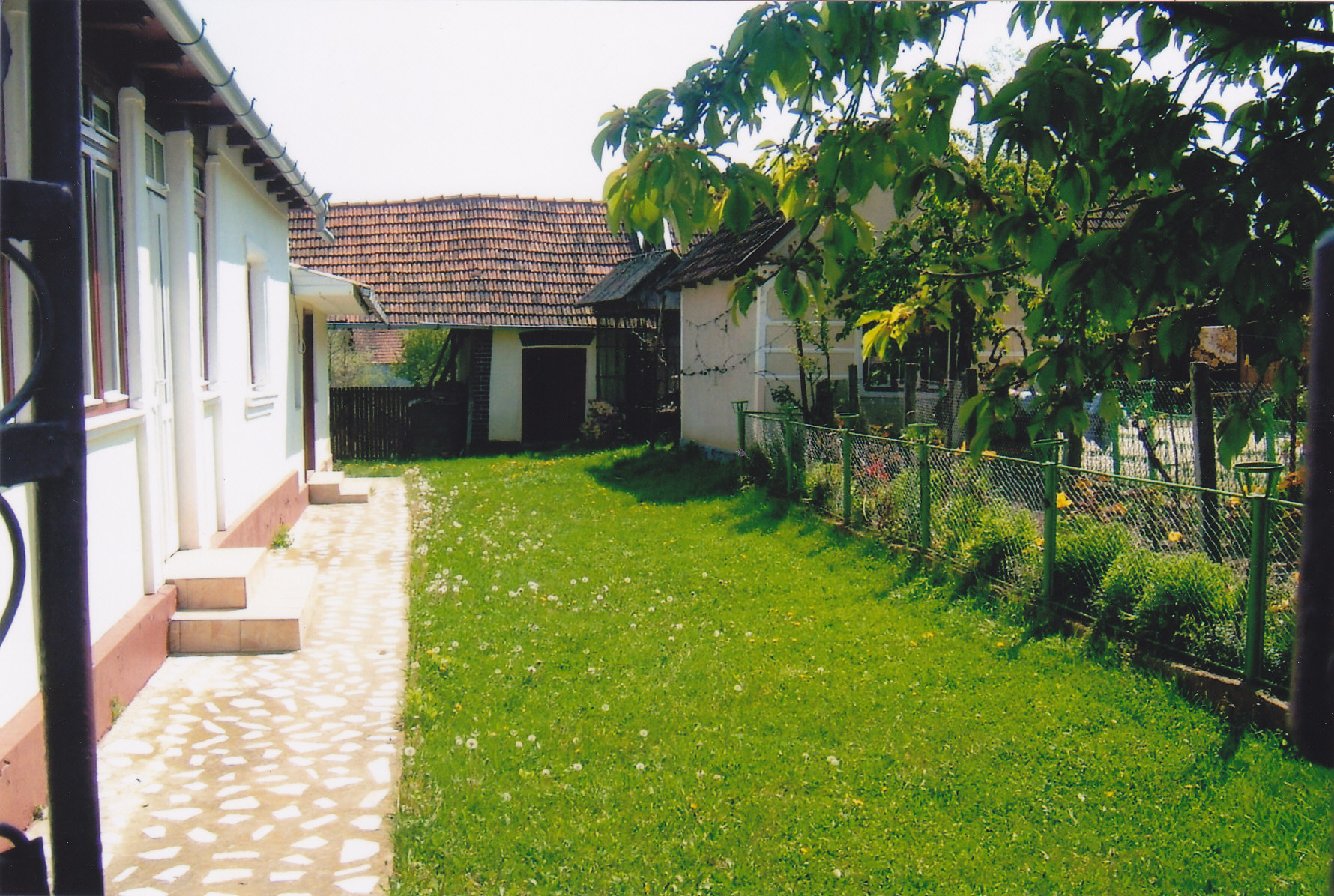 Gospodărie construită în 1948 și renovată în 1992